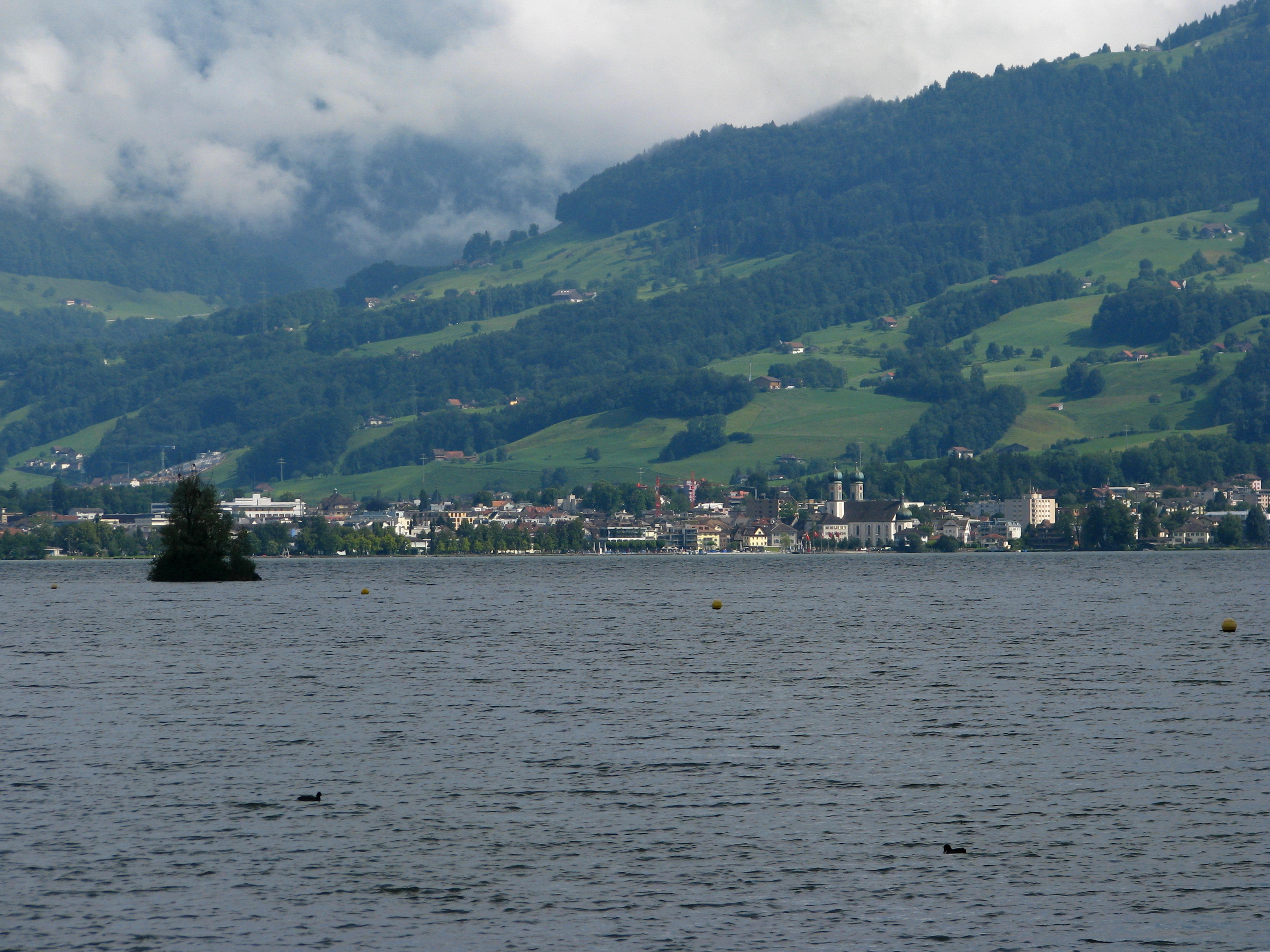 Lachen (SZ) and upper Lake Zürich, as seen from Rapperswil (SG)